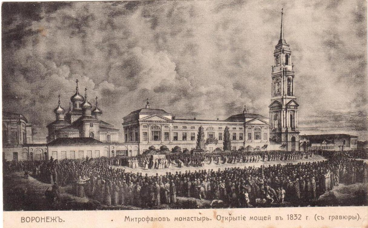 Открытие мощей святого Митрофана